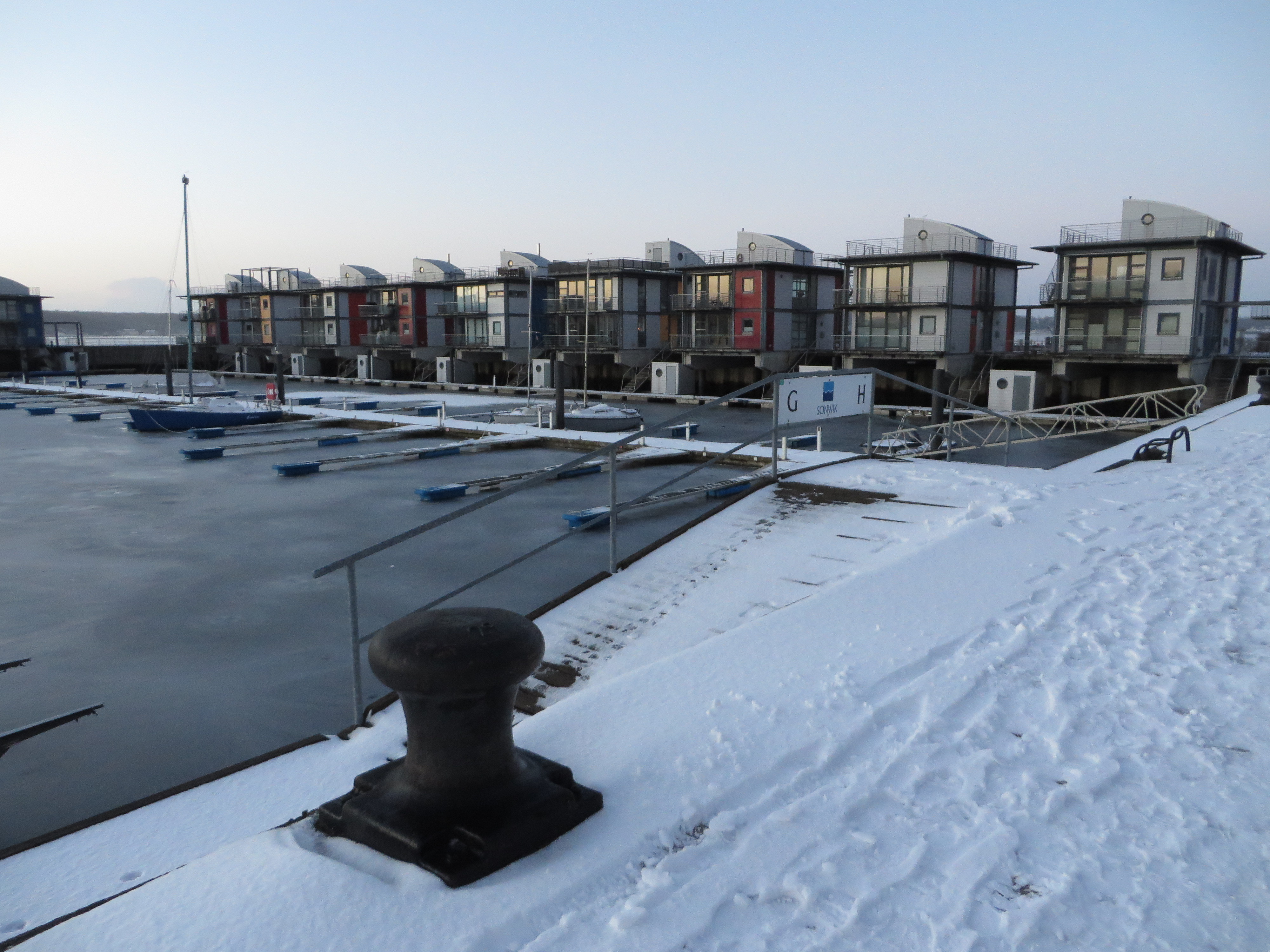 Marina Sonwik im Winter (Mürwik Januar 2015)